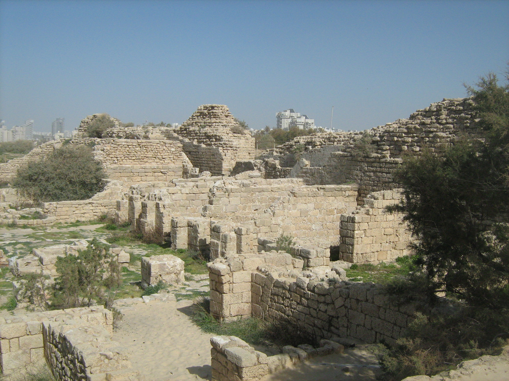 אשדוד ים